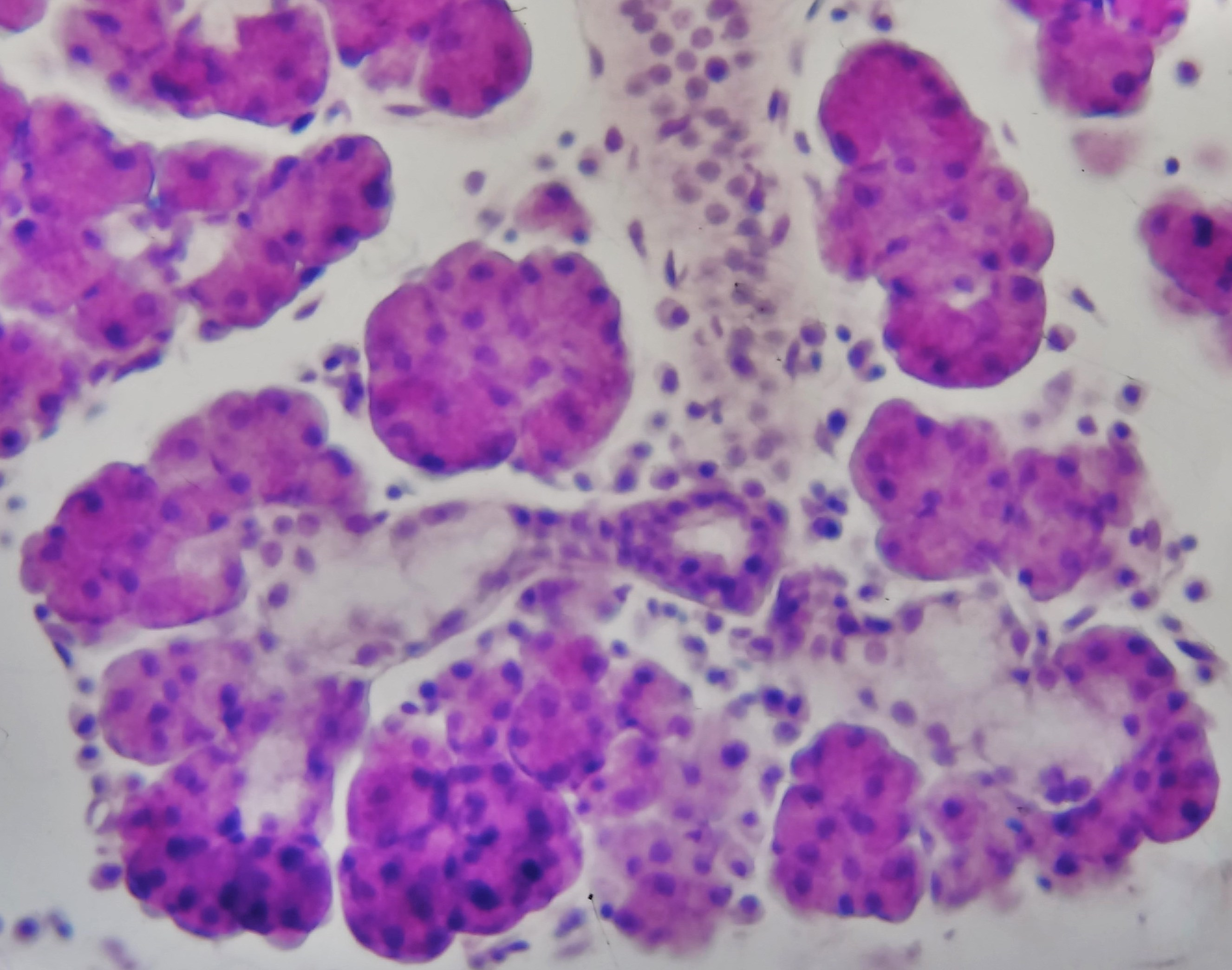 Mikroskopisches Schnittbild dert Glandula submanibularis